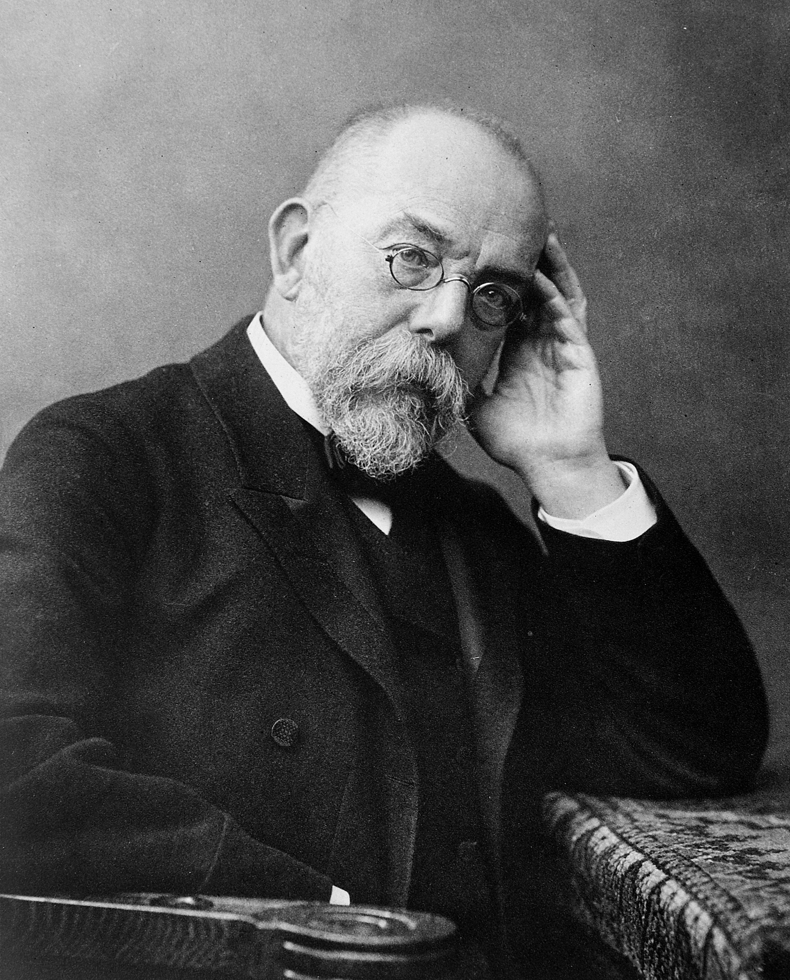 Robert Koch. Fotogravur nach einer Fotografie von Wilhelm Fechner, um 1900.[1]